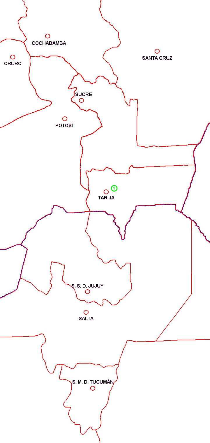 Rebutia heliosa subsp. teresae - mapa Mapu výskytu R. heliosa subsp. teresae vytvořil Sida